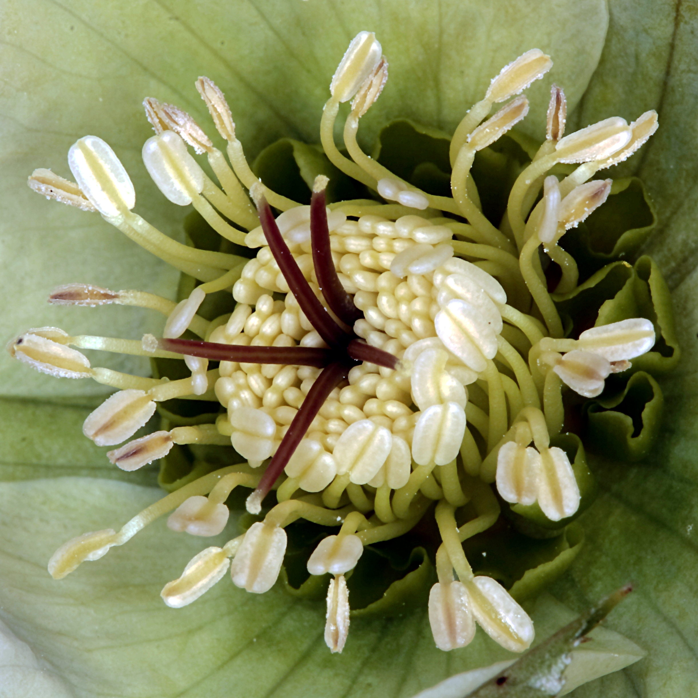 Schneerose